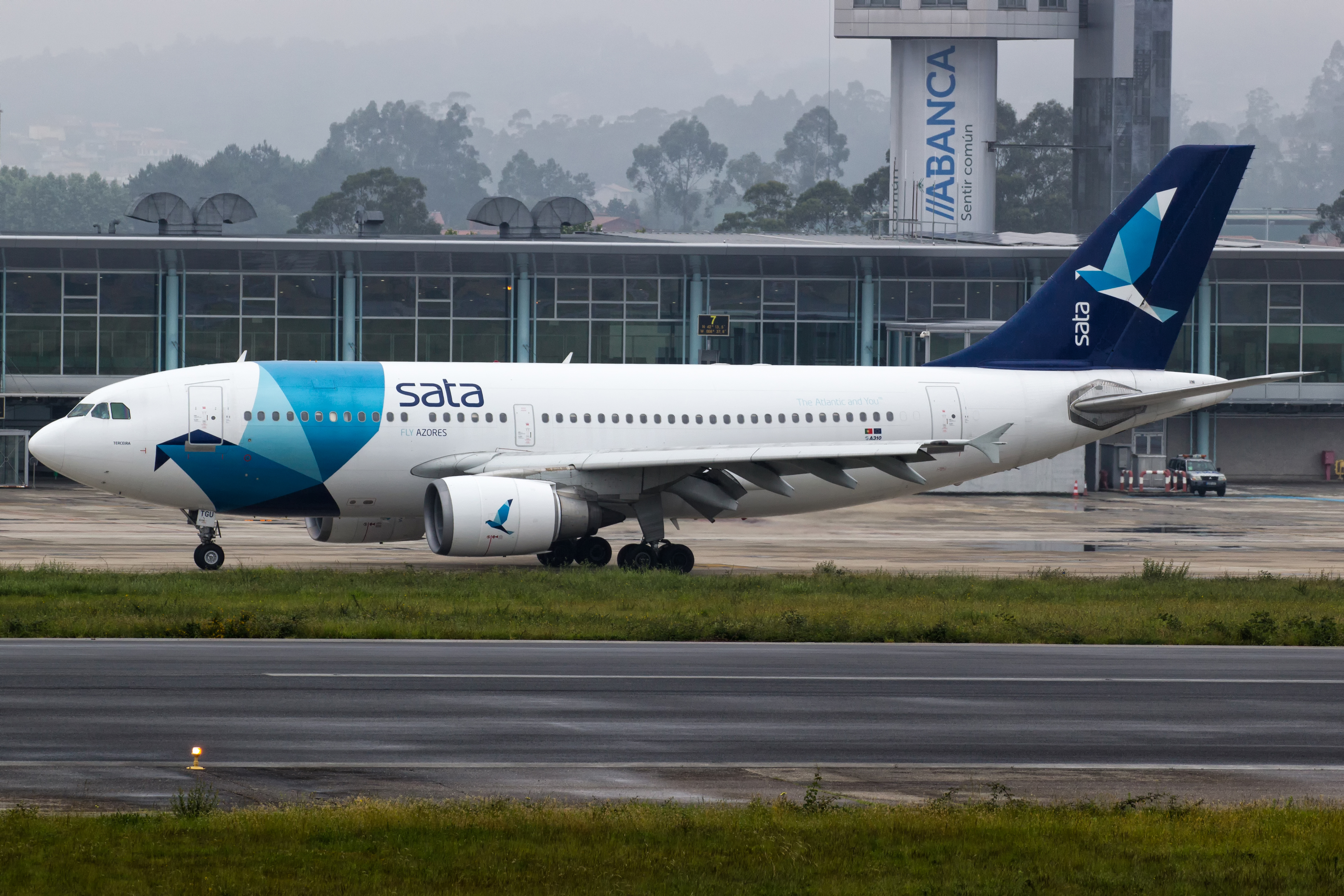 Airbus A310 de SATA na plataforma do aeroporto de Vigo.